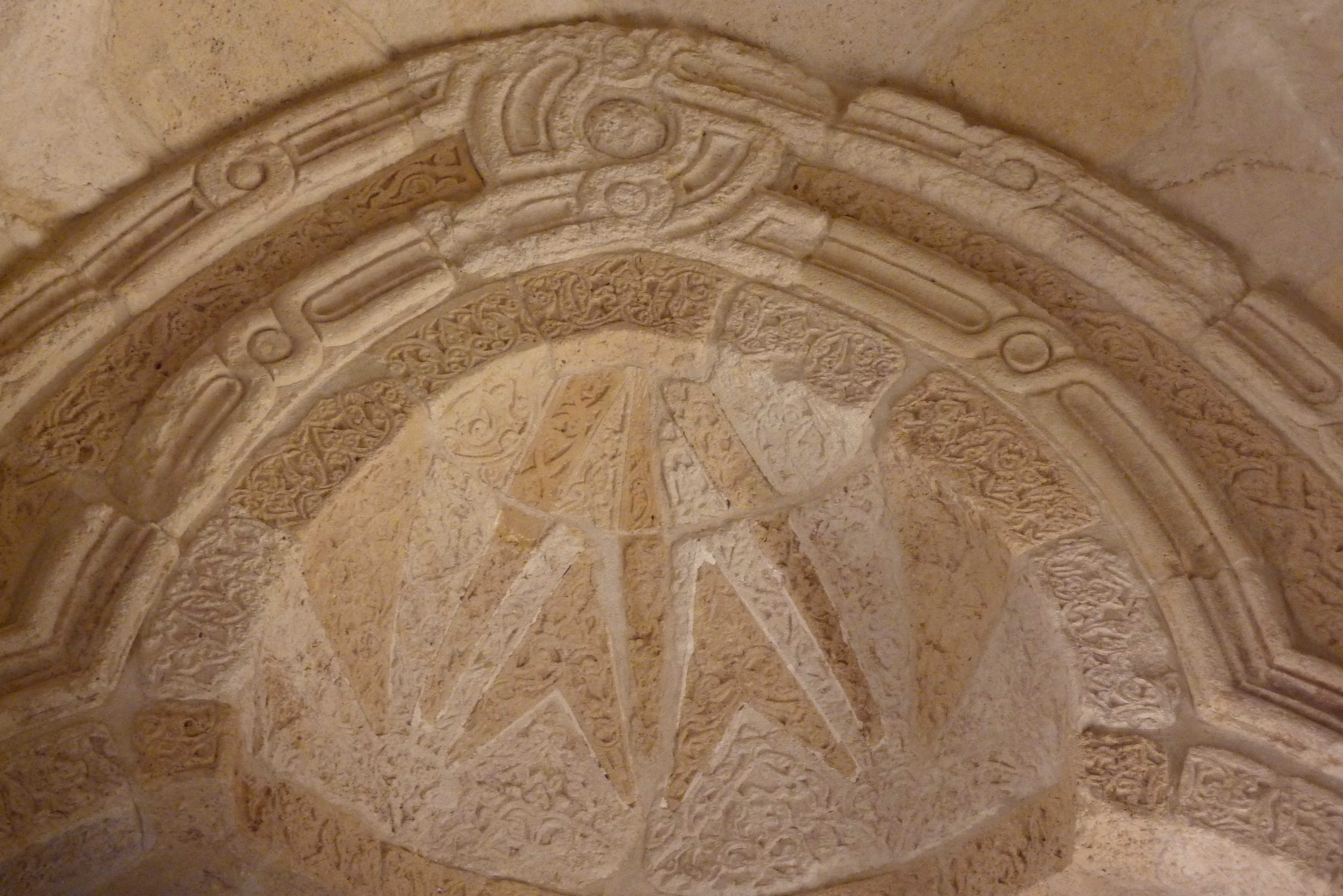 Porche Mamlouk, Torbau eines Wohnhauses in Kairo aus der 2. Hälfte des 15. Jahrhunderts; Abteilung Kunst des Islam im Louvre in Paris